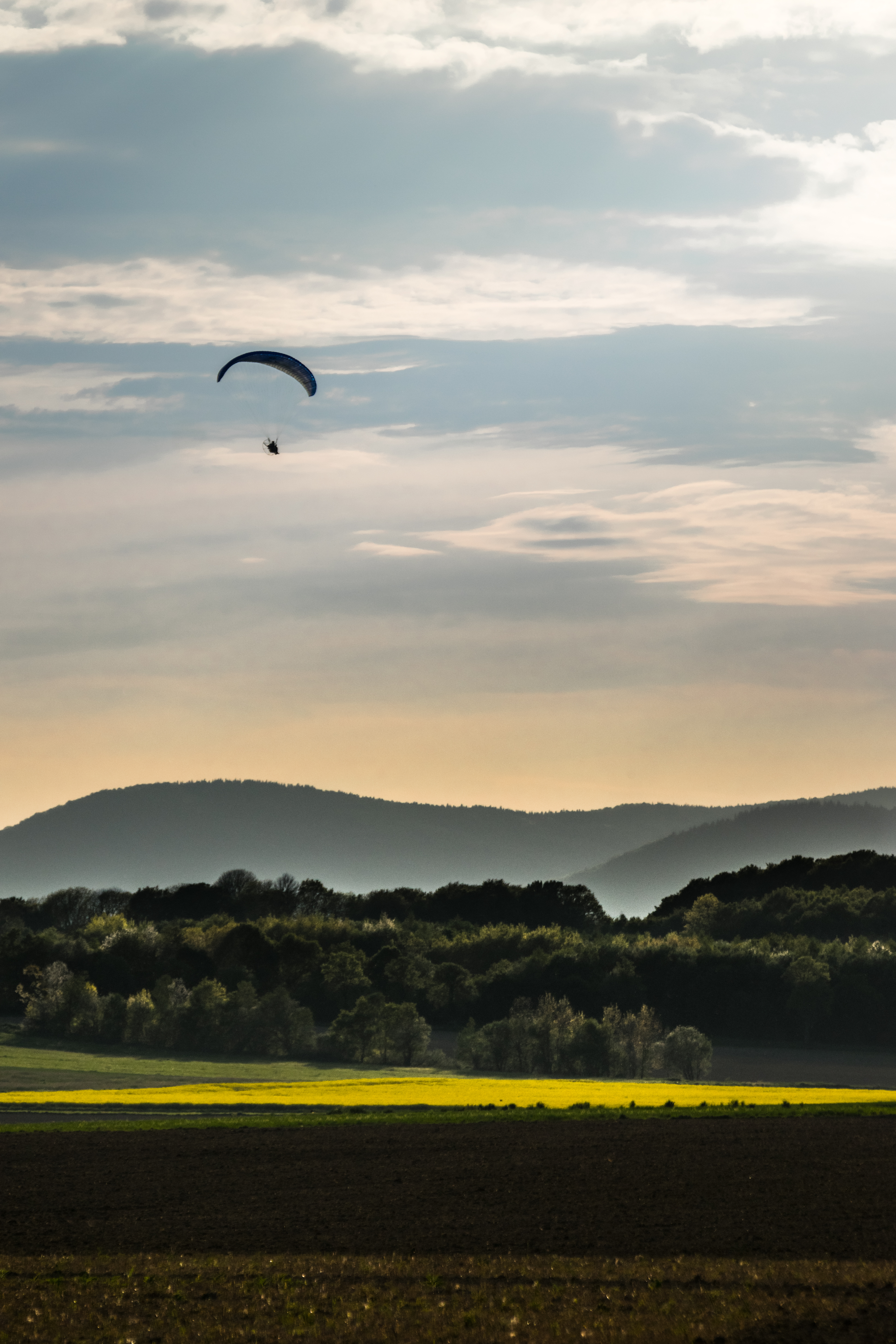 ULM survolant le sud de la chaîne de montagne des Vosges à Sentheim dans le parc naturel régional des Ballons des Vosges, Alsace, France.